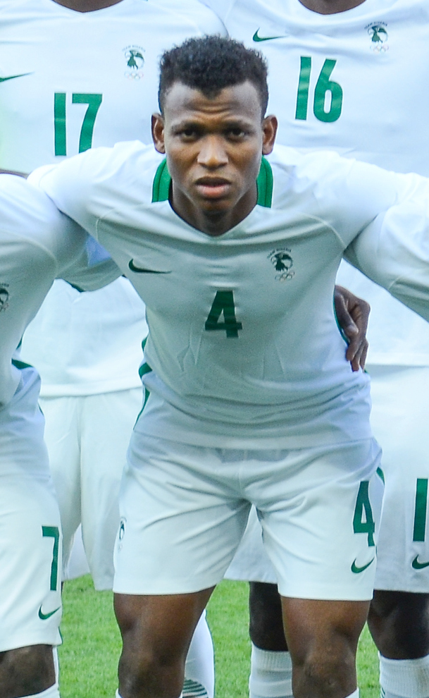 São Paulo - Alemanha vence a Nigéria por 2 a 0 e se classifica para a final na Arena Corinthians (Rovena Rosa/Agência Brasil)